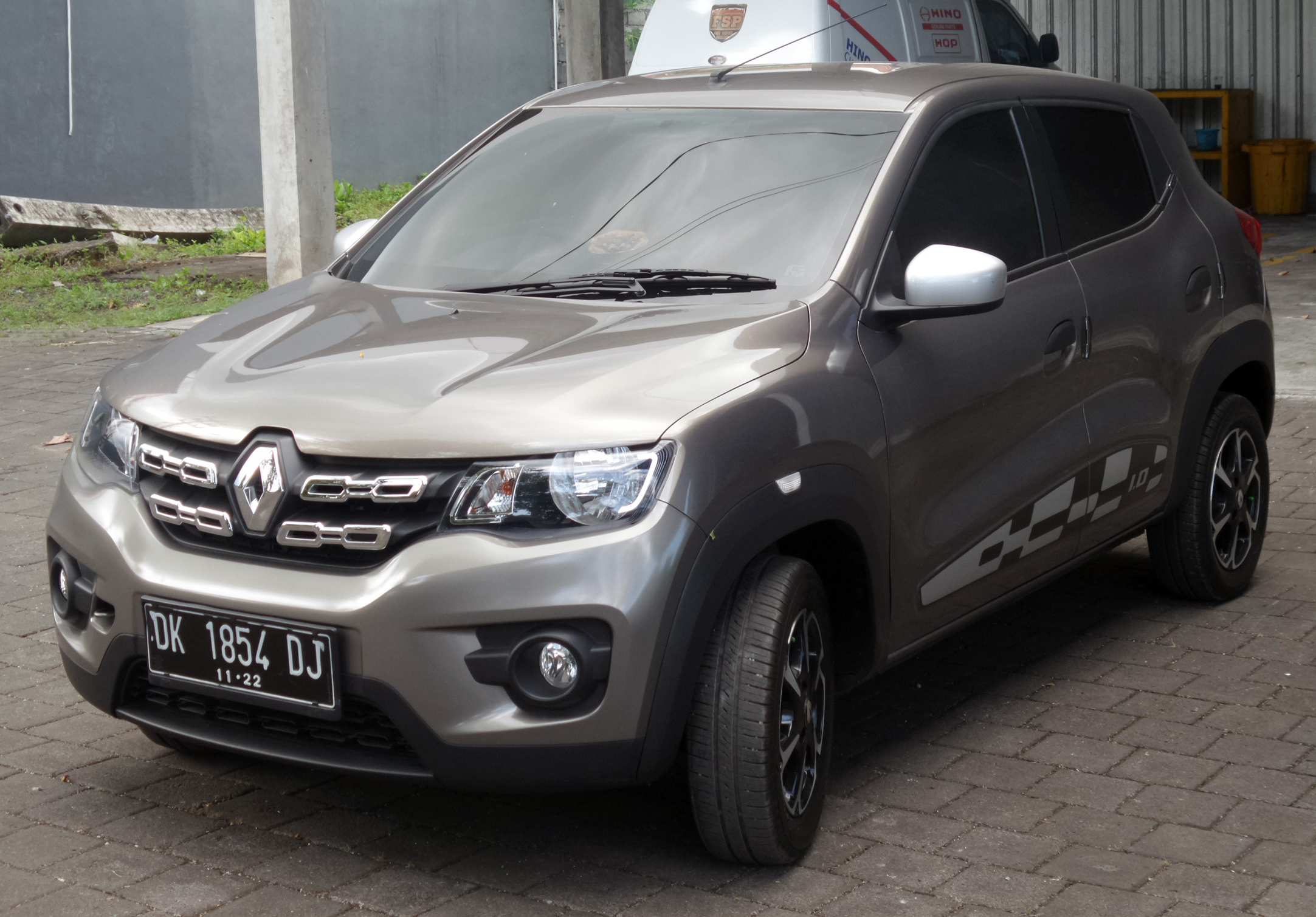 Hatchback murah Renault Kwid di Jalan Untung Surapati, Karangasem, Bali. Walau dijual di Indonesia dengan harga menyaingi mobil LCGC, sayang jarang yang minat.